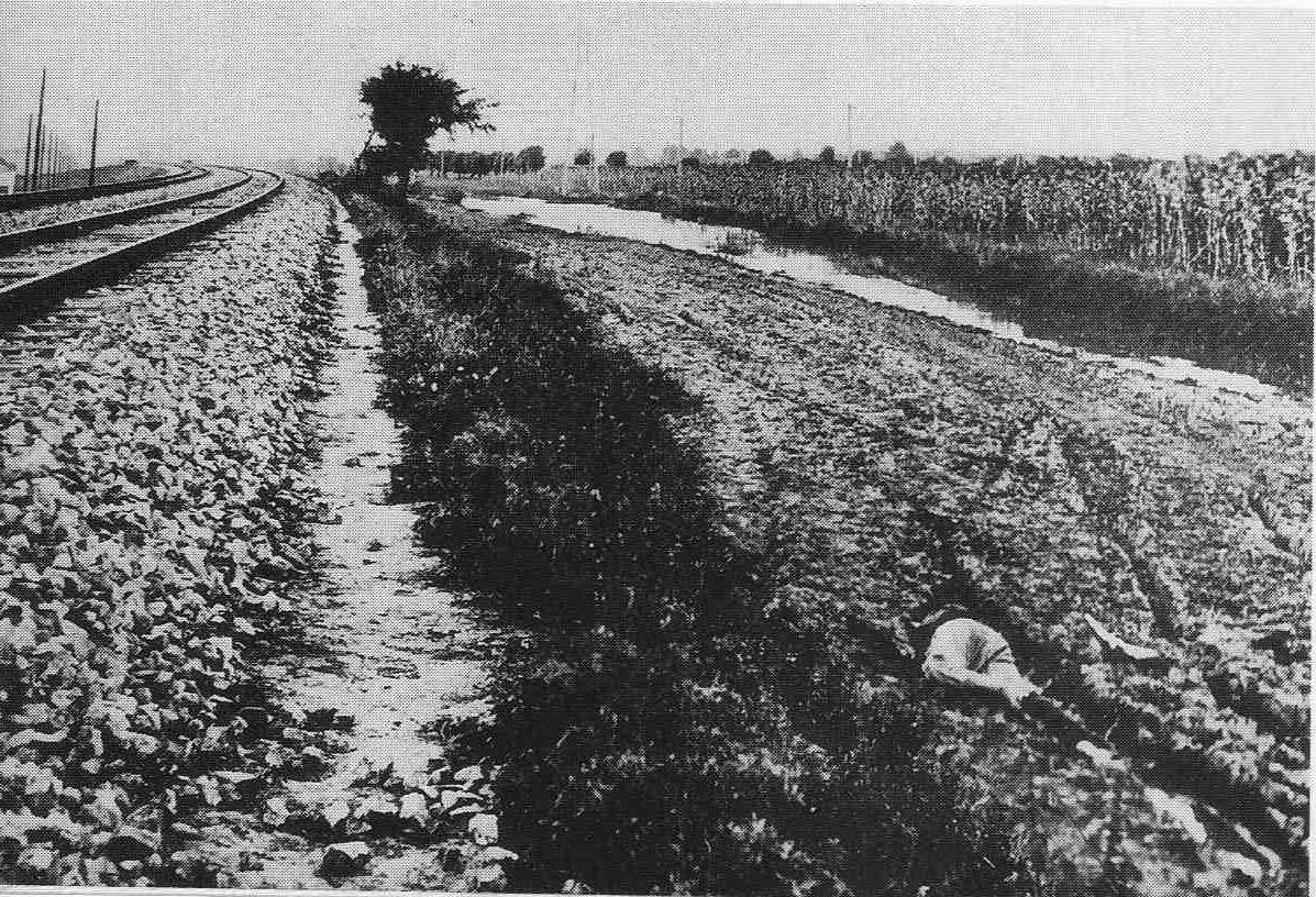 満州事変のきっかけとなった柳条湖事件の鉄道爆破地点、線路は修復されているが、なぜか「工作員」とされる死体が写っている。この写真は発表済みである。